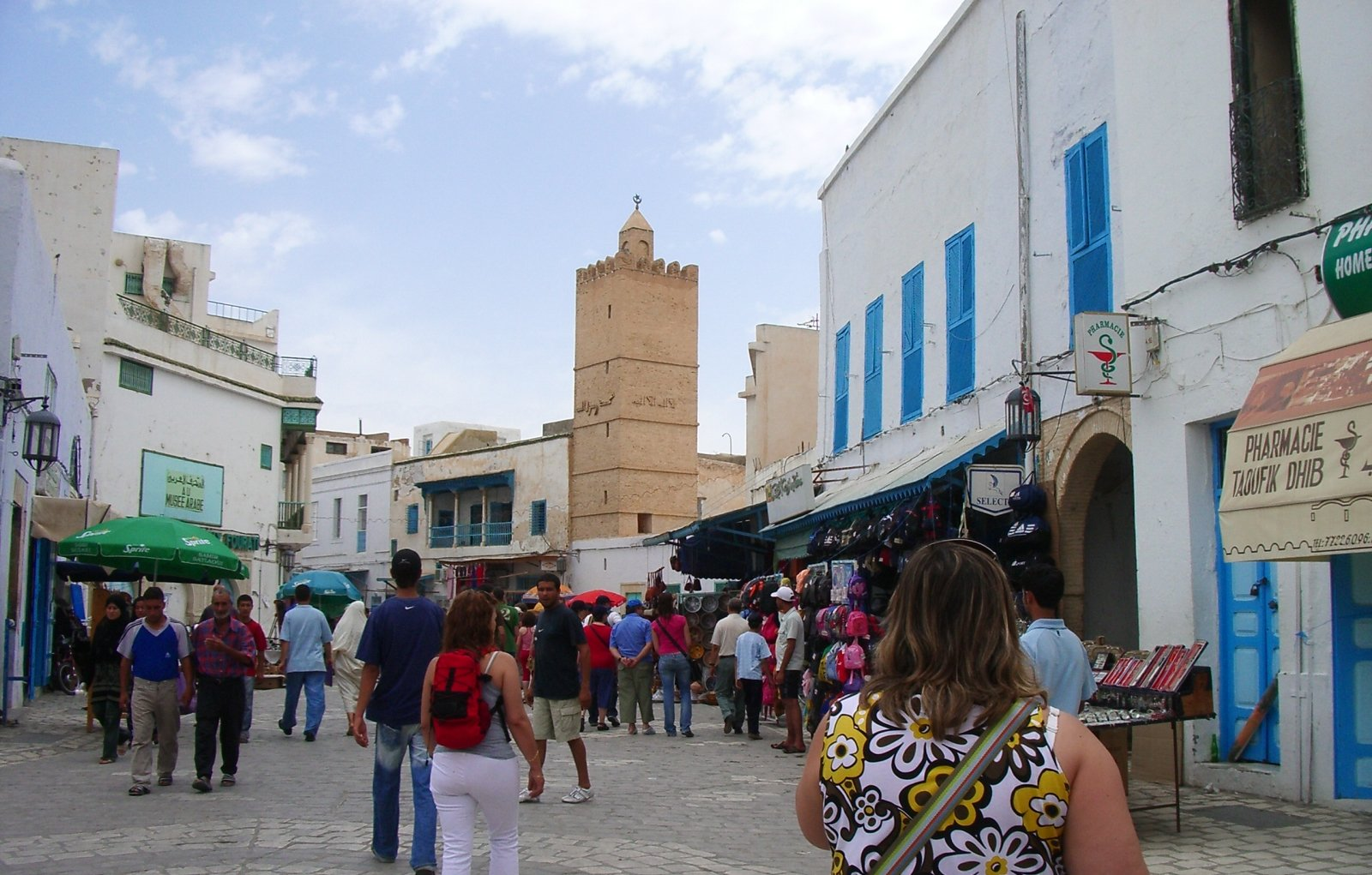 Bir Baruta a Kairouan